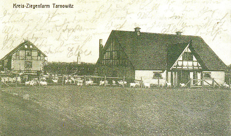 Powiatowa ferma kozia w Tarnowskich Górach, ok. 1904-1906